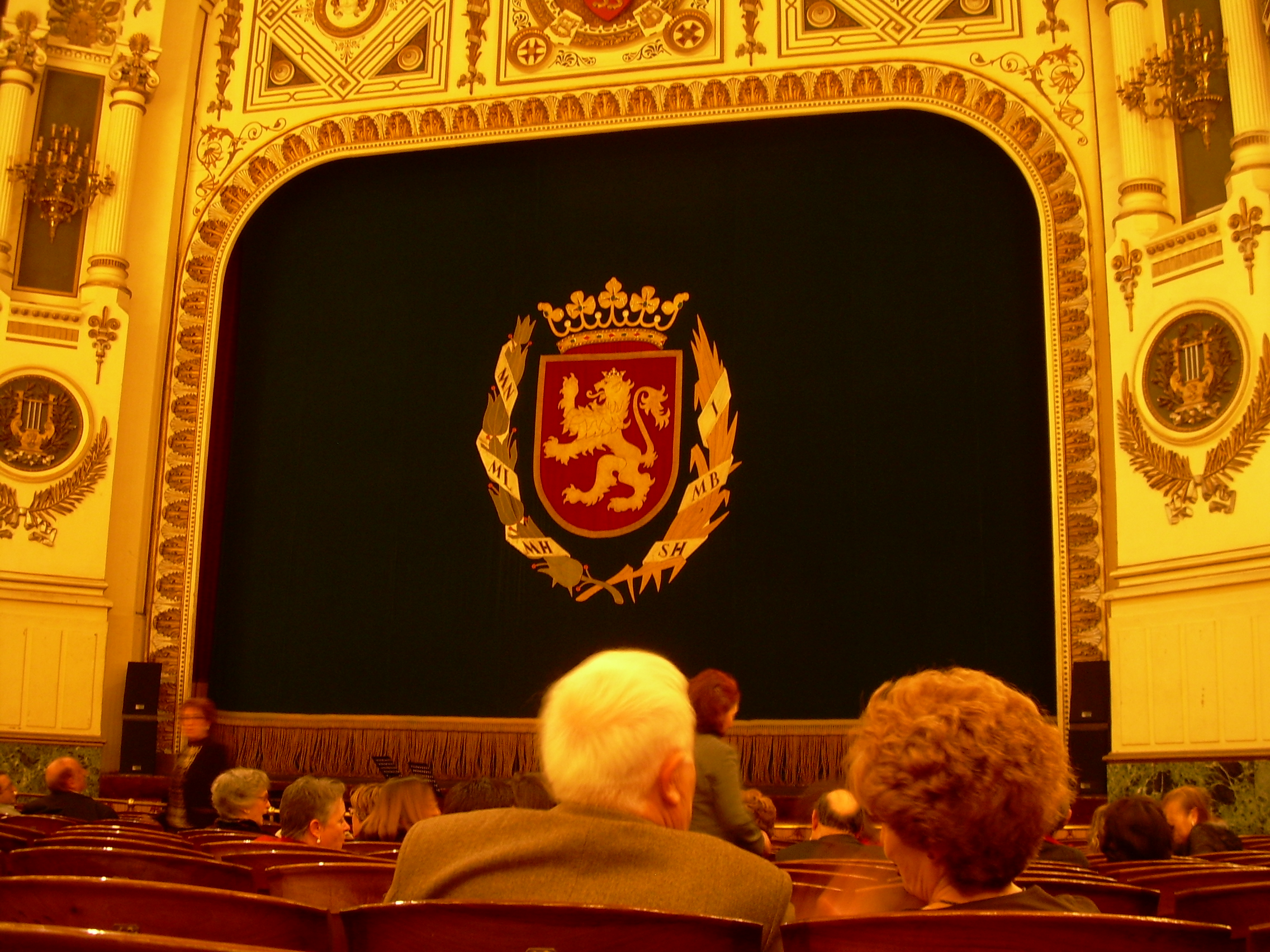 Teatro Principal de Zaragoza, interior